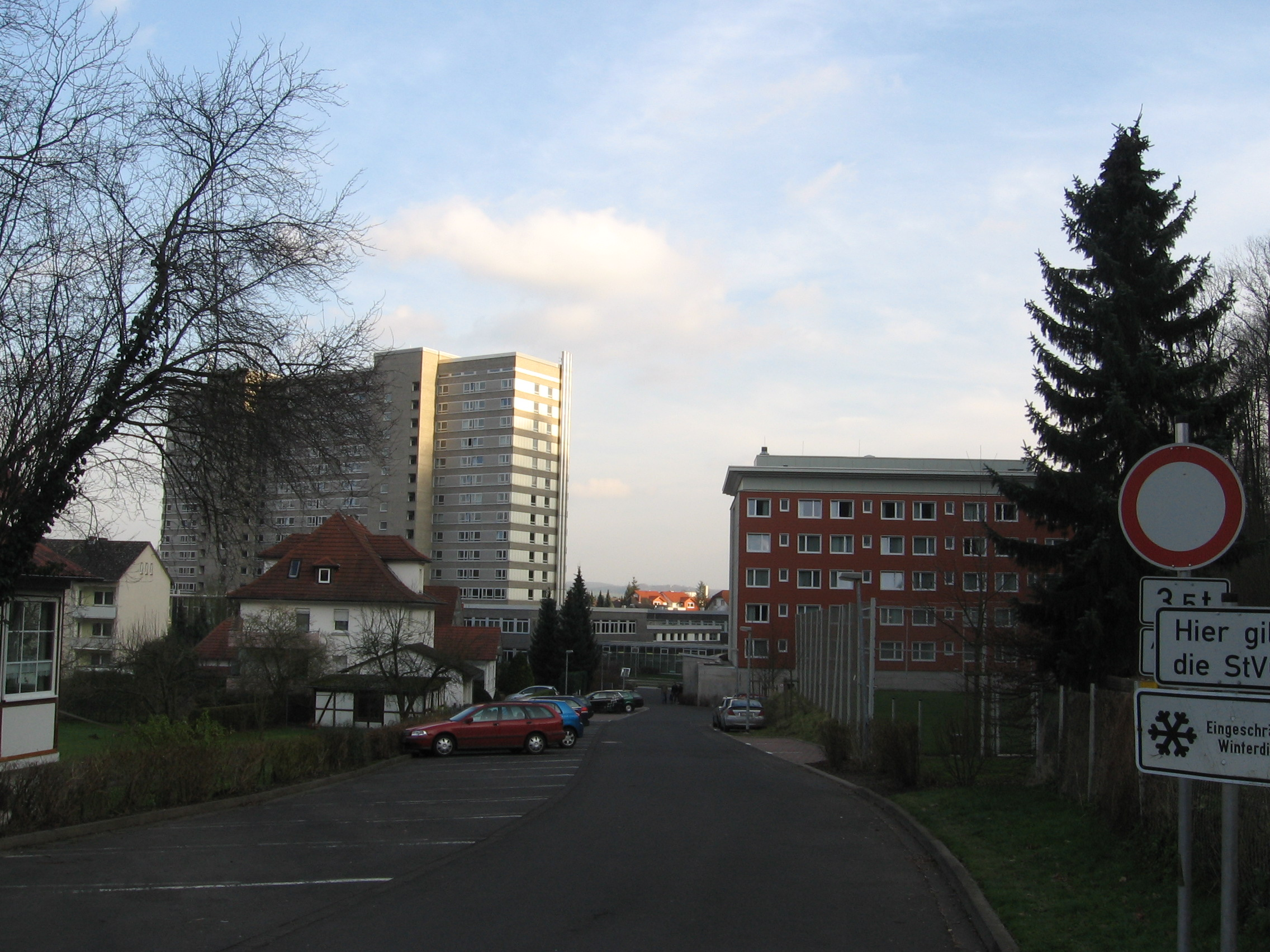 Verwaltungsfachhochschule Rotenburg von der Weidenbergasse aus